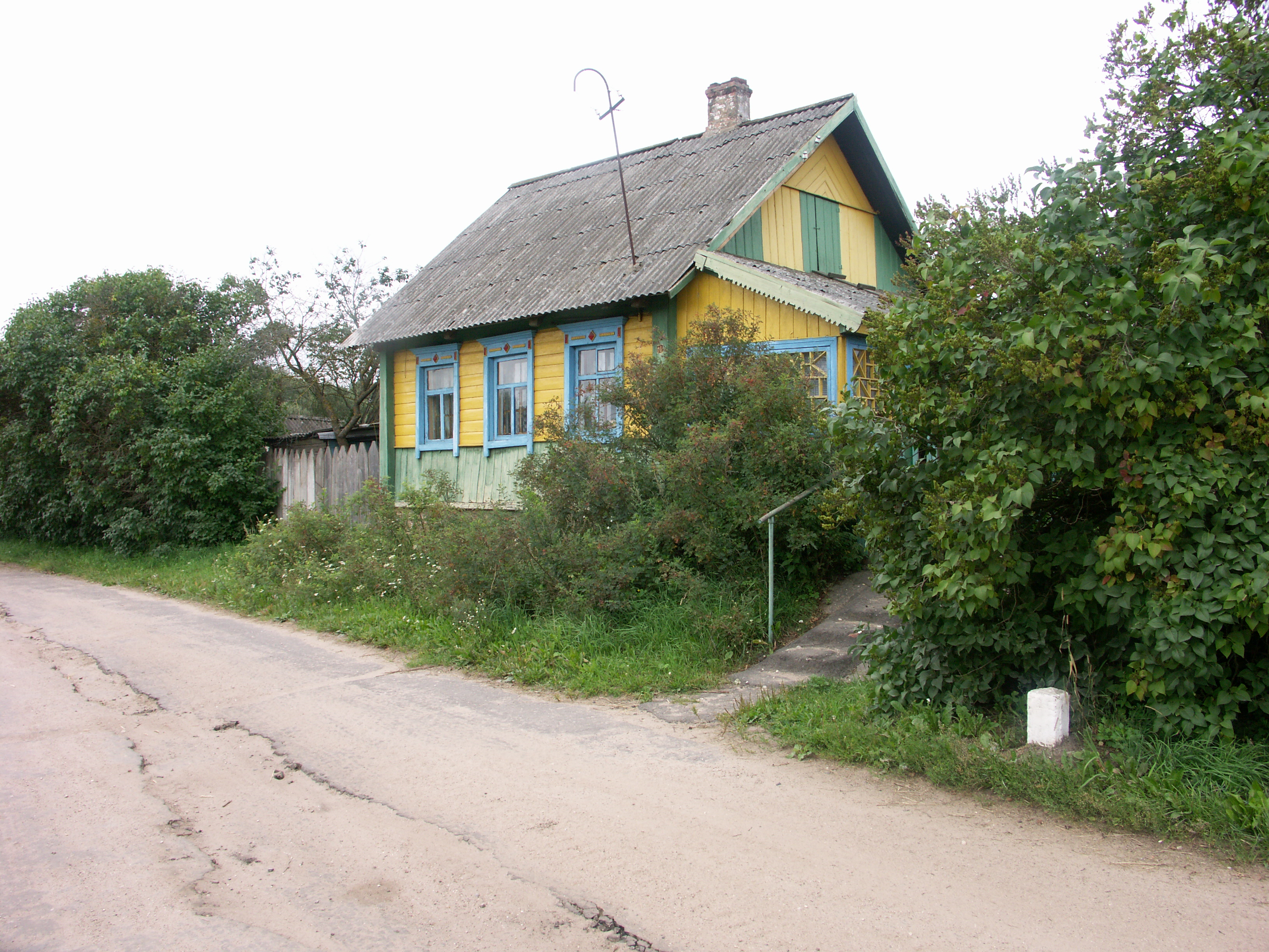 Бобыничи, Полоцкий район. До Великой Отечественной войны этот дом принадлежал еврейской семье.